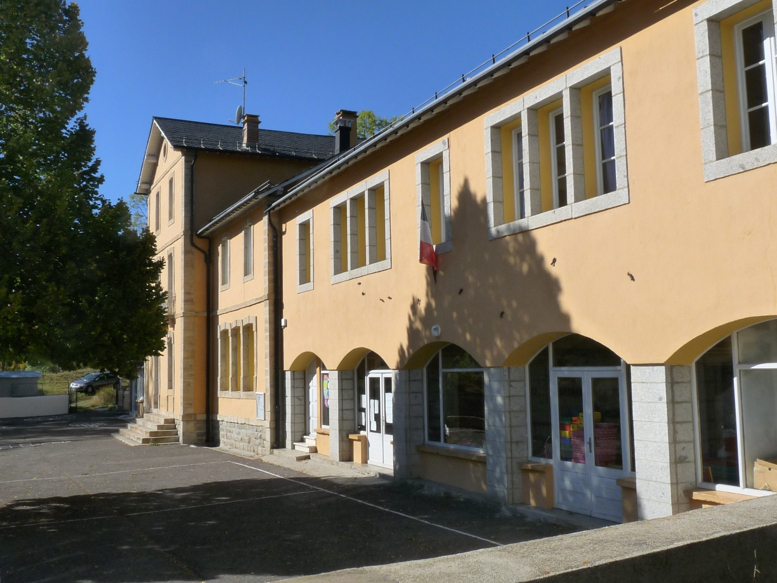 Ecole de Mont-Louis, Pyrénées-Orientales, France